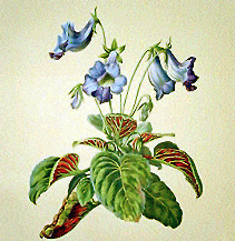 From: Anton Hartinger (1806 - 1890). "Paradisus Vindobonensis. Abbildungen seltener und schönblühender Pflanzen der Wiener und anderer Museen." Vienna, 1844 - 1860.